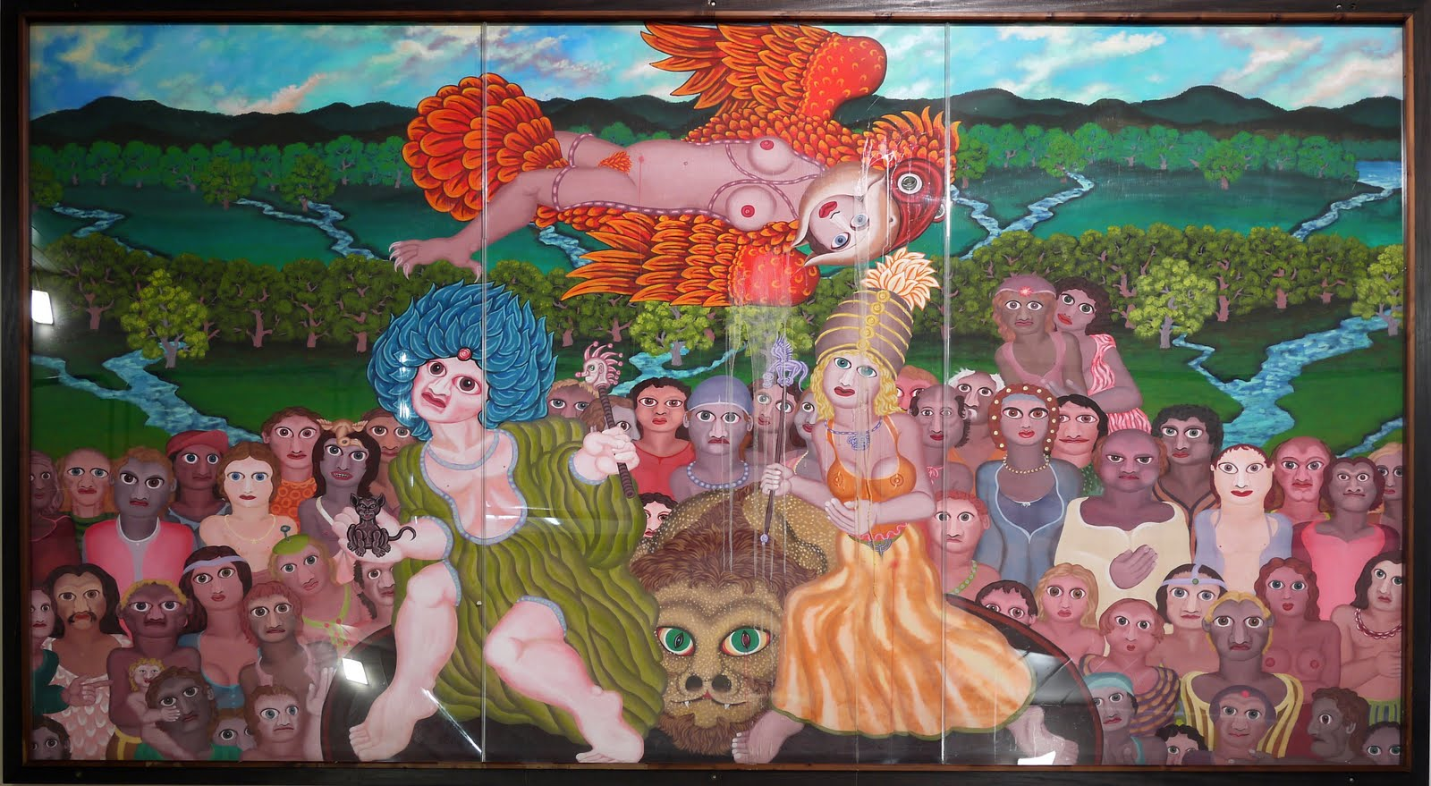 Alterlaa Kunst am Bau